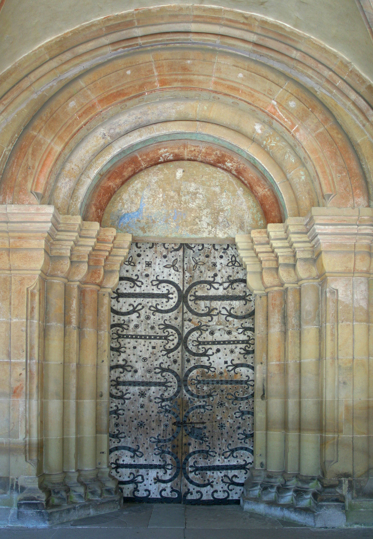 Portal der Klosterkirche Maulbronn